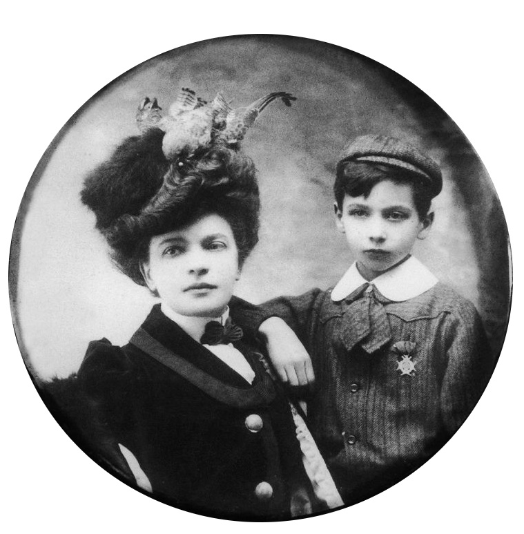 Photographie de Louis Aragon et sa mère Marguerite Toucas, vers 1905, photographe inconnu.